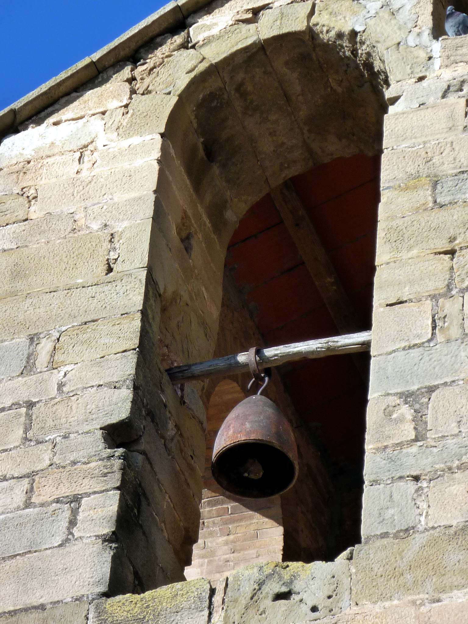 Església de l'Assumpció de Baldomar (Artesa de Segre): ogiva d'un obús per campana